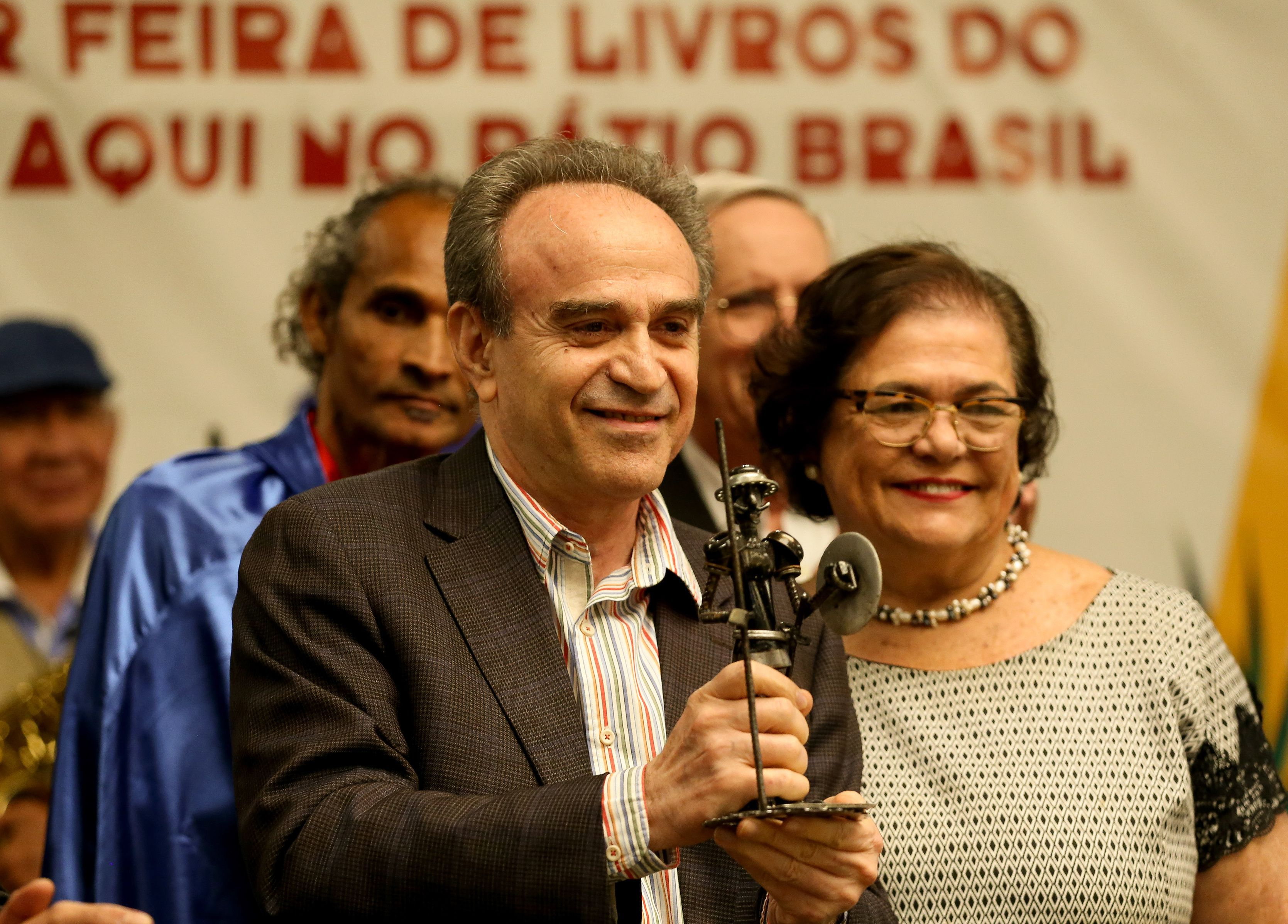 Brasília - O escritor e diplomata João Almino, eleito em março deste ano como imortal da Academia Brasileira de Letras (ABL) é um dos homenageados da 33ª Feira do Livro de Brasília